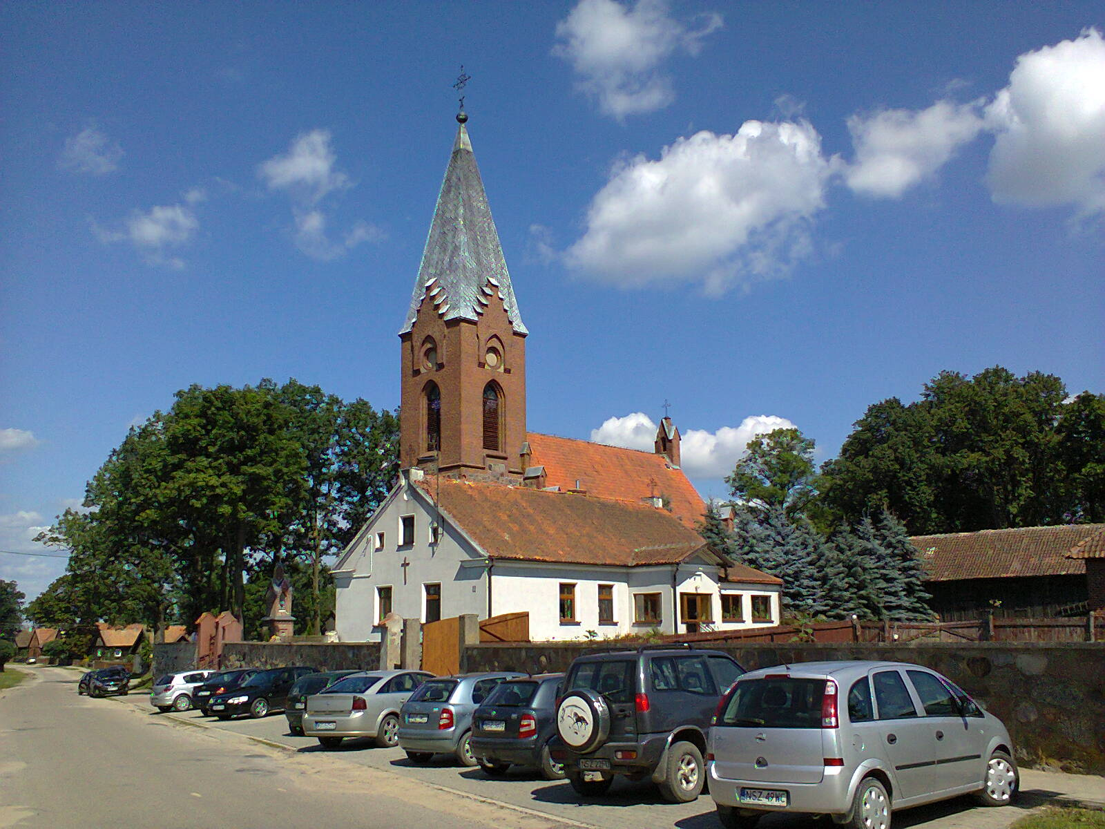 Klon - kościół pw. Znalezienia Krzyża Świętego (powiat szczycieński)